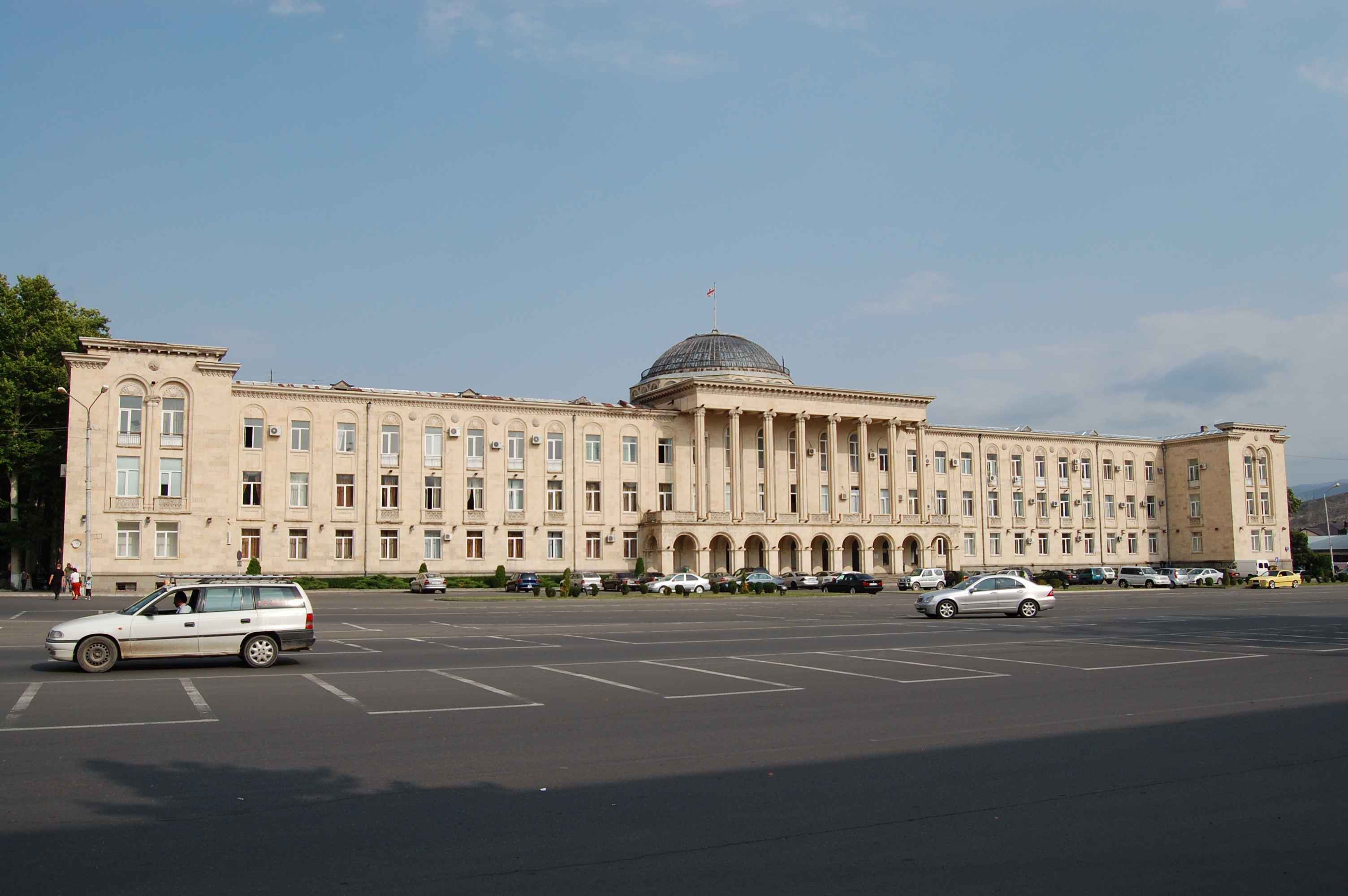 Gori Georgia - Sakartvelo